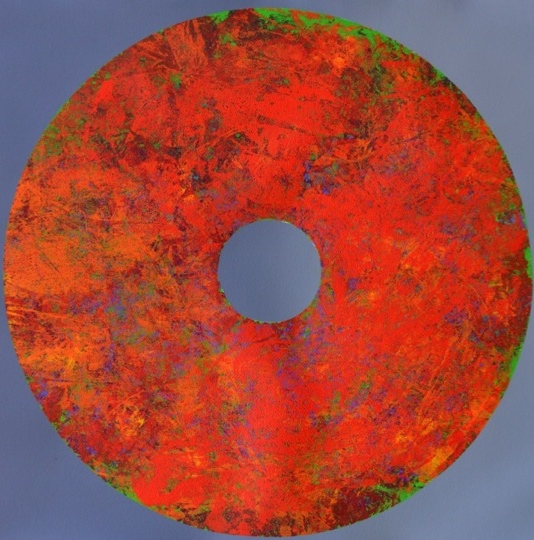 disque